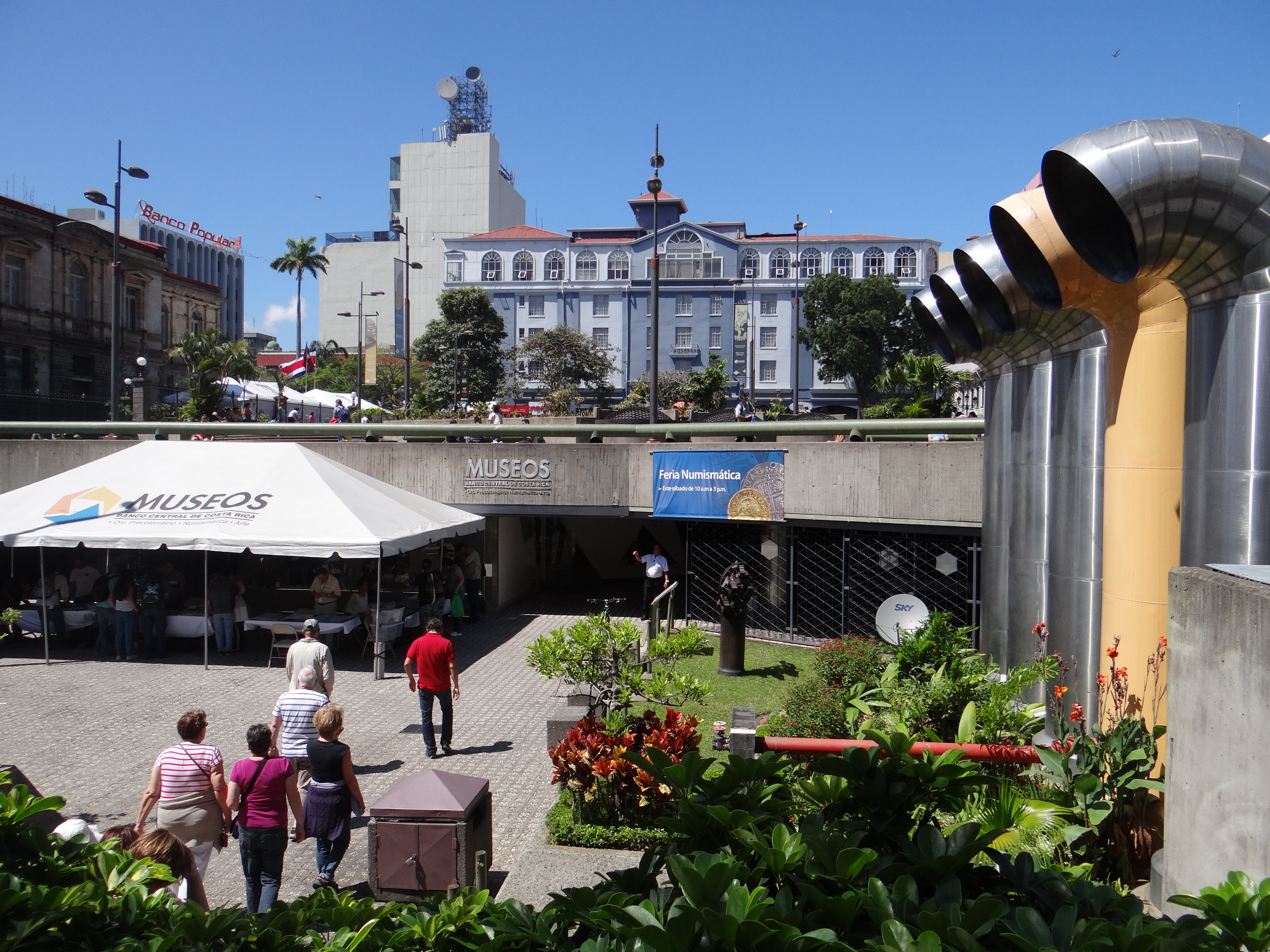 Entrée du Musée de l'Or précolombien, San José, Costa Rica.